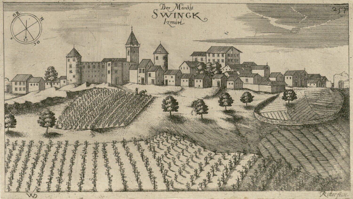 Žminj